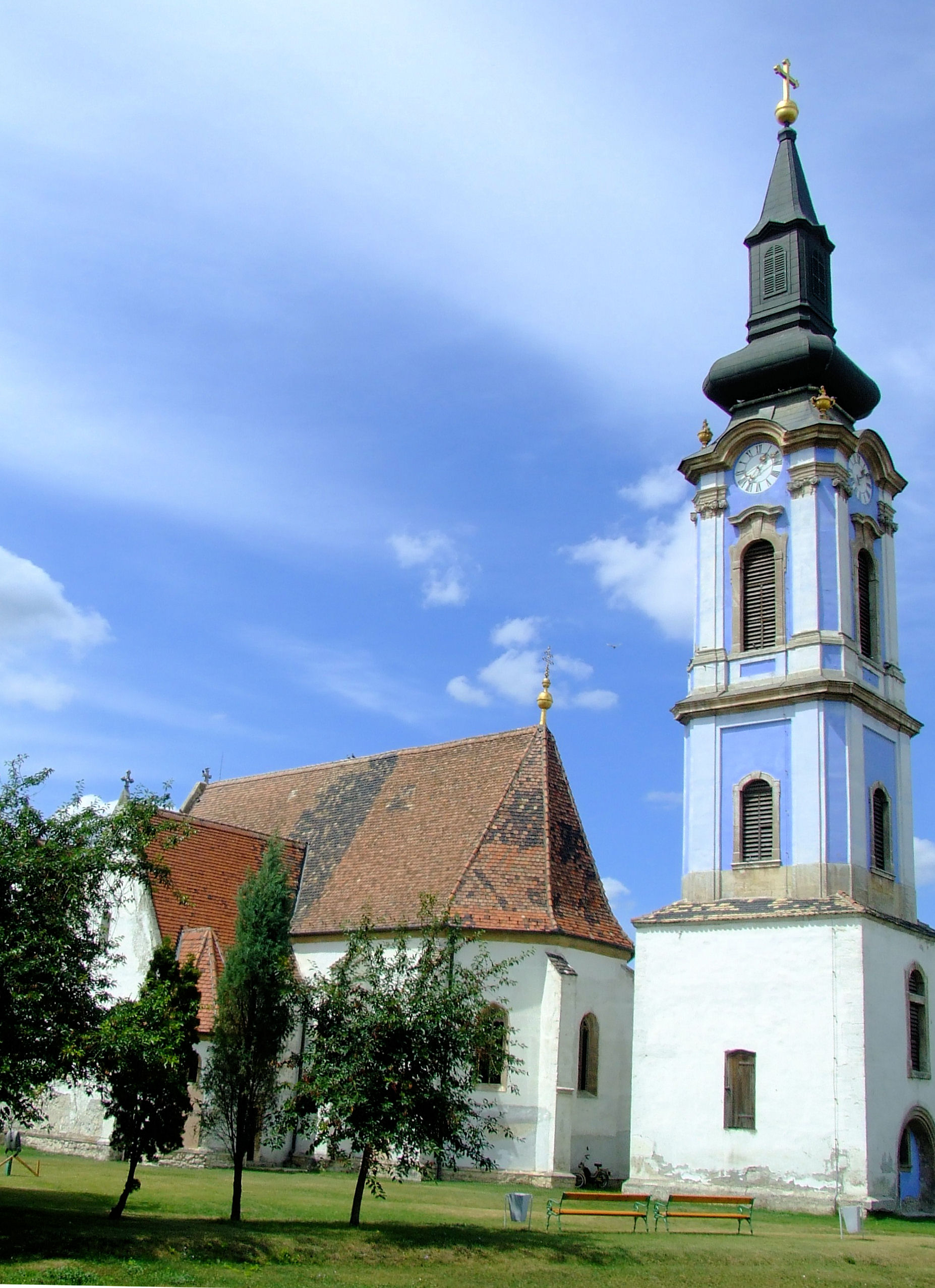 A ráckevei, Boldogasszony tiszteletére emelt szerb ortodox templom. Magyarország egyetlen gótikus stílusú szerb temploma. Épült 1487-ben